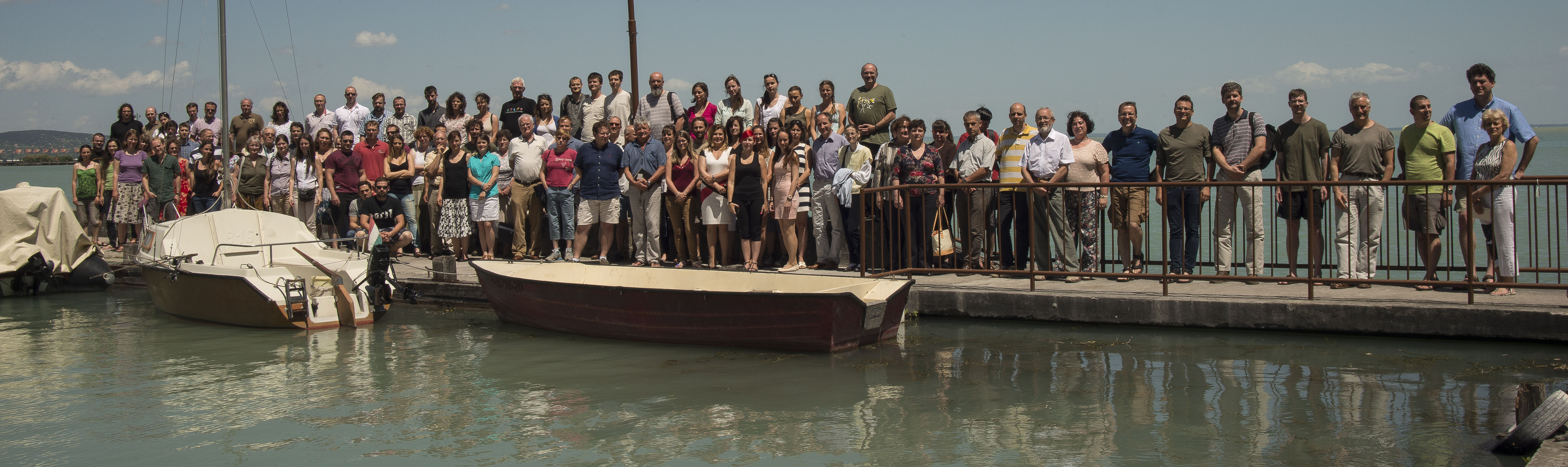 MTA ÖK Napok 2016 Tihany - csoportkép